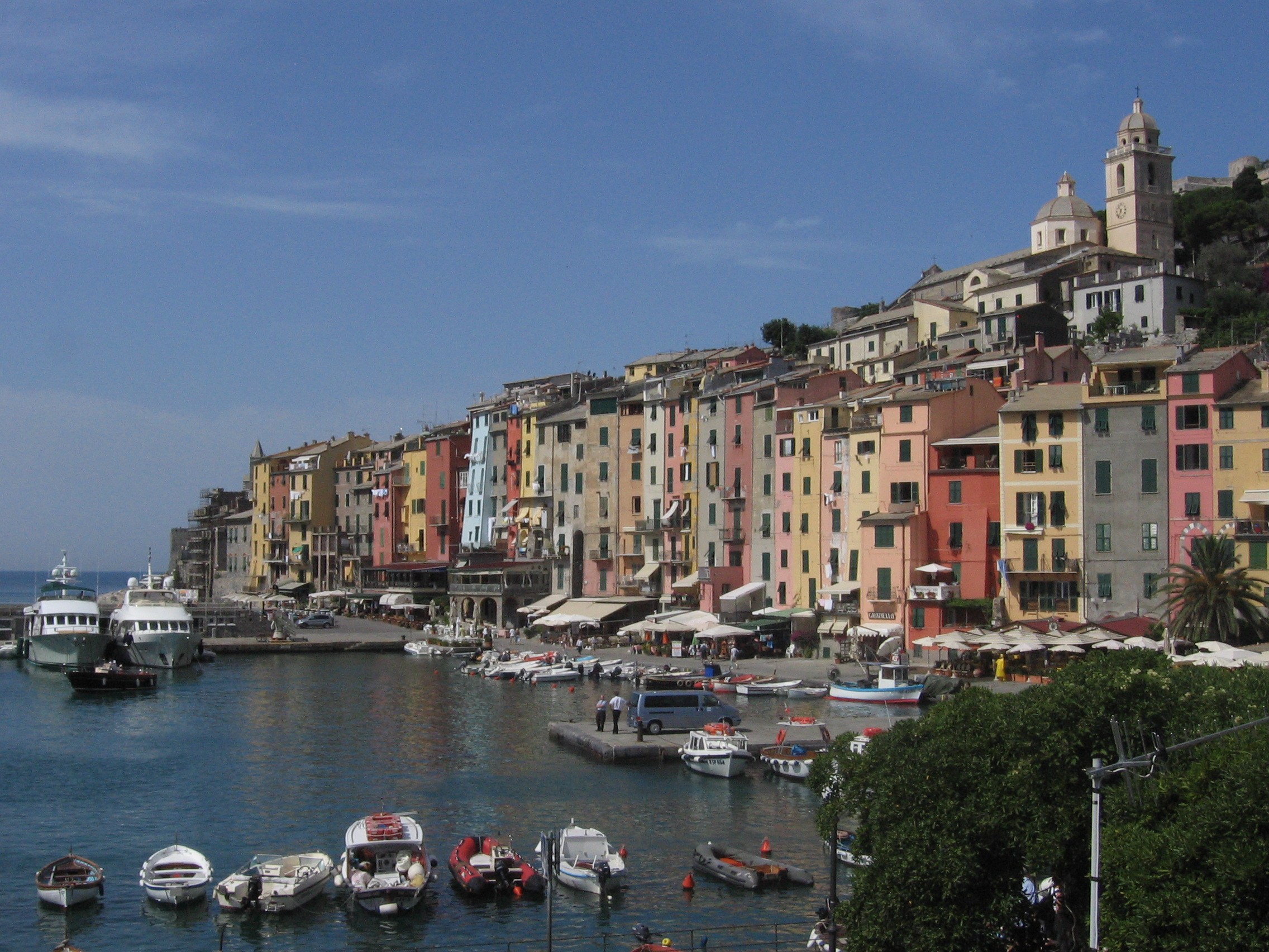 Portovenere